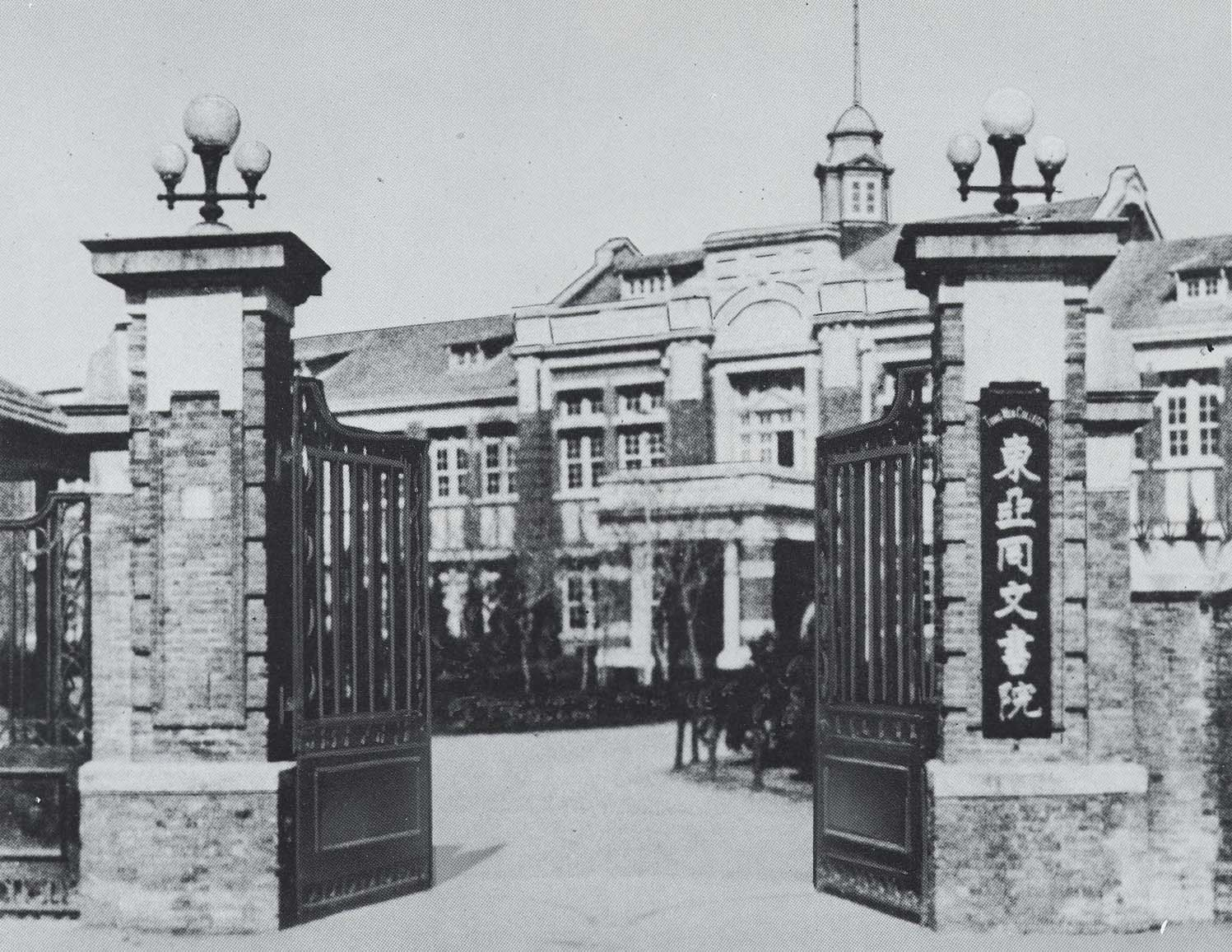 虹橋路より見た東亜同文書院大学正門（後身愛知大学）